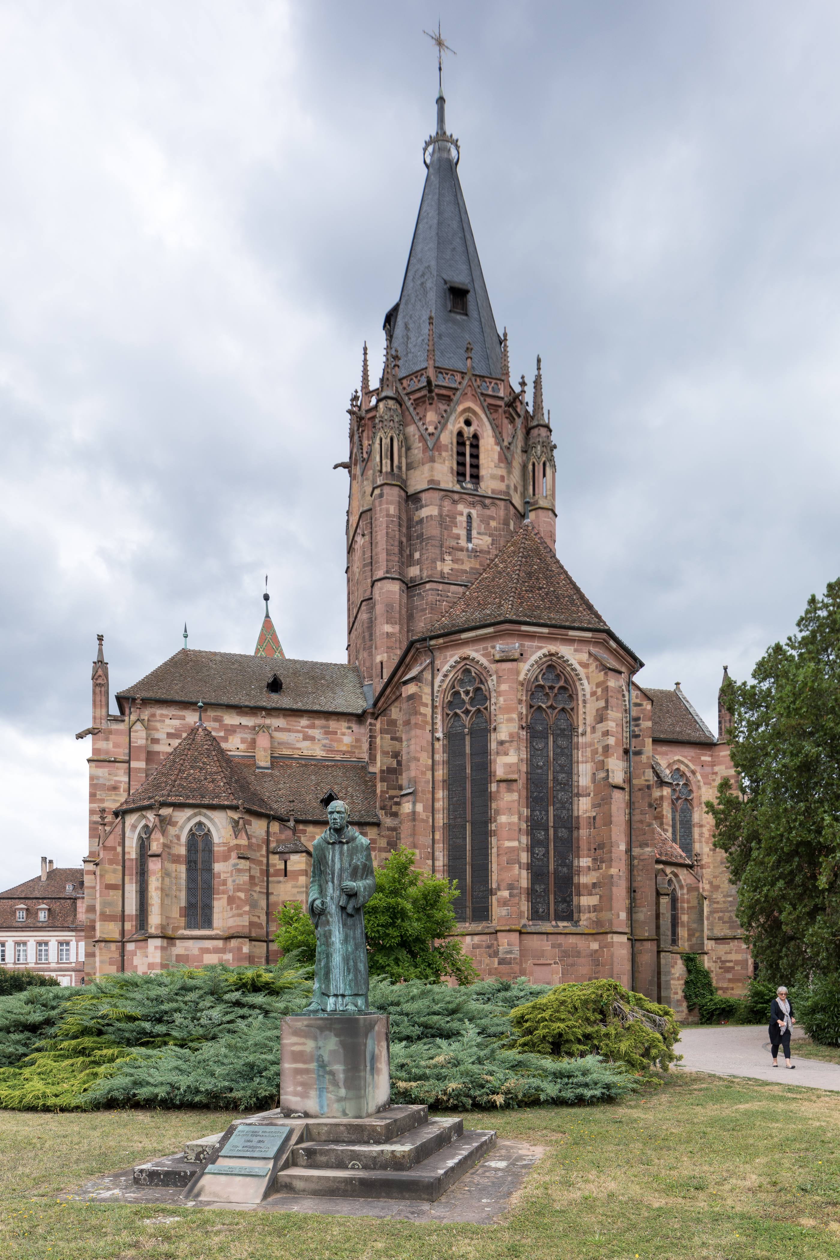 Stiftskirche Peter & Paul in Wissembourg